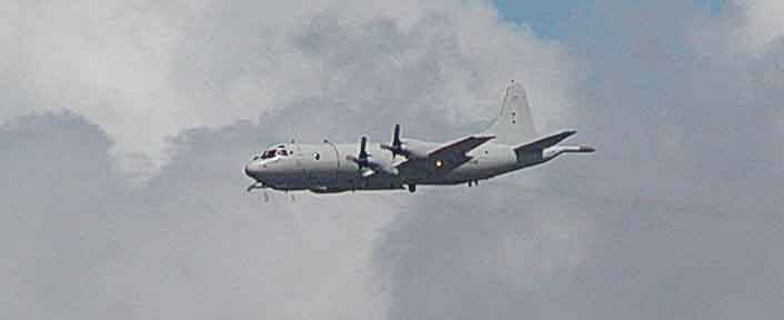 Der Ubootjäger „Orion“ über der Elbemündung